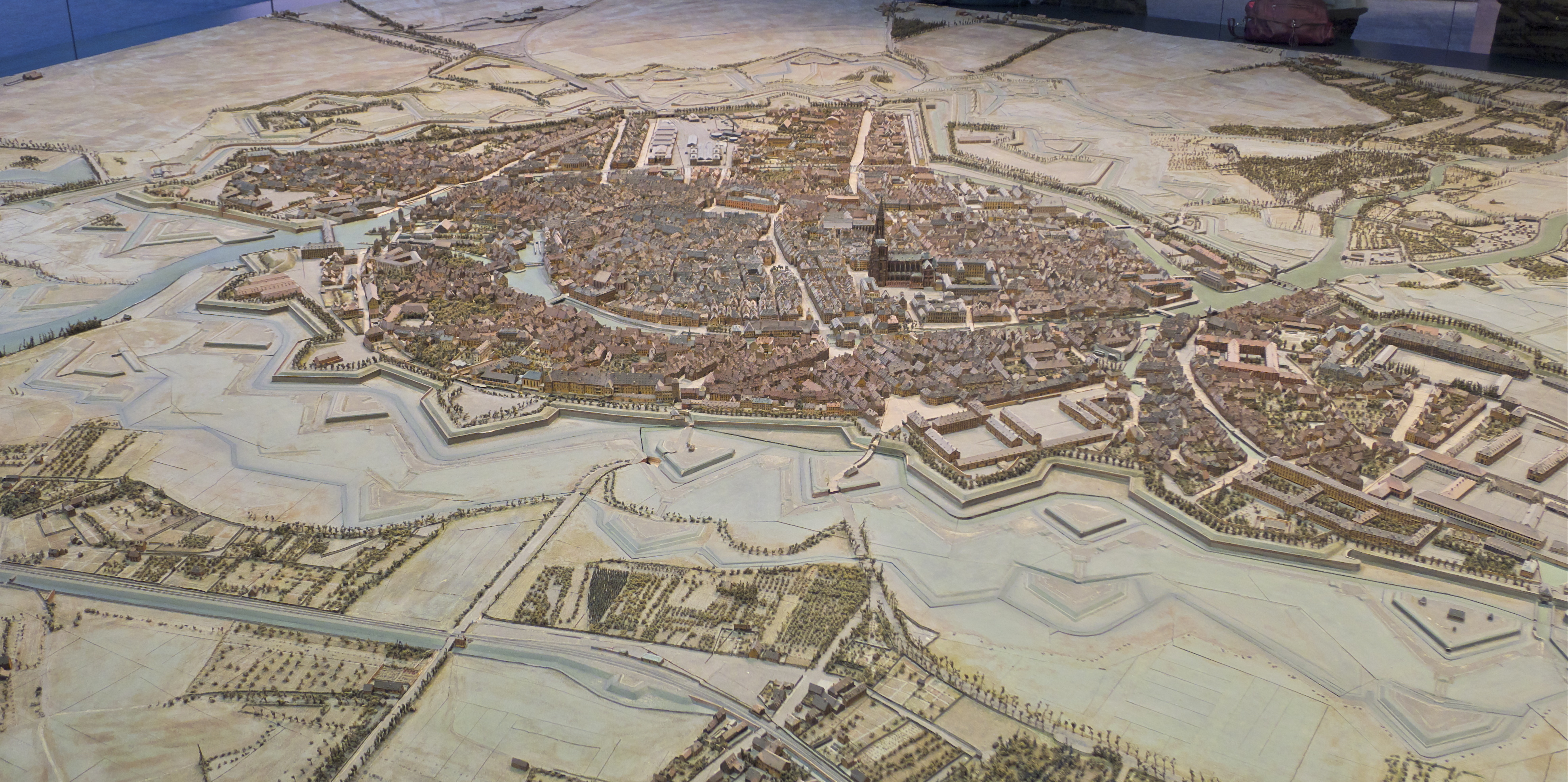 Plan-relief de Strasbourg en 1863. Plan-relief construit de 1830 à 1836 sous la direction de Boitard et actualisé de 1852 à 1863. Échelle 1/600e